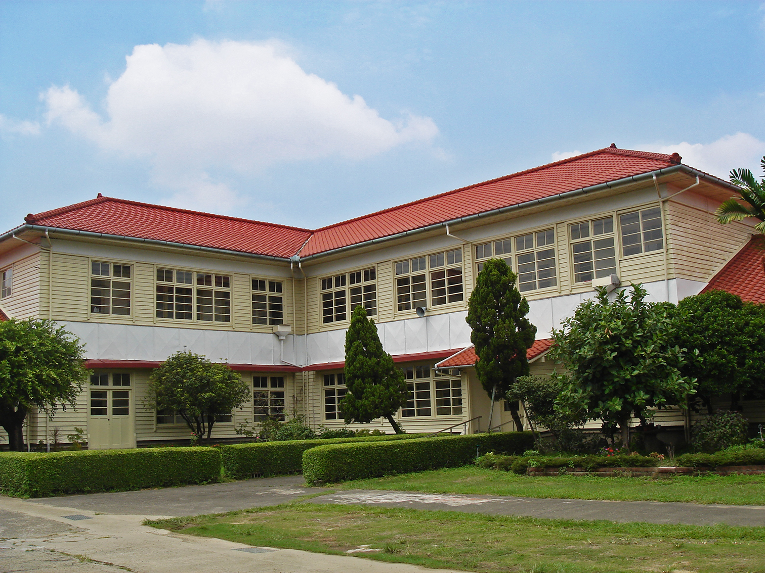 行政院農業委員會農糧署中區分署台中辦事處。